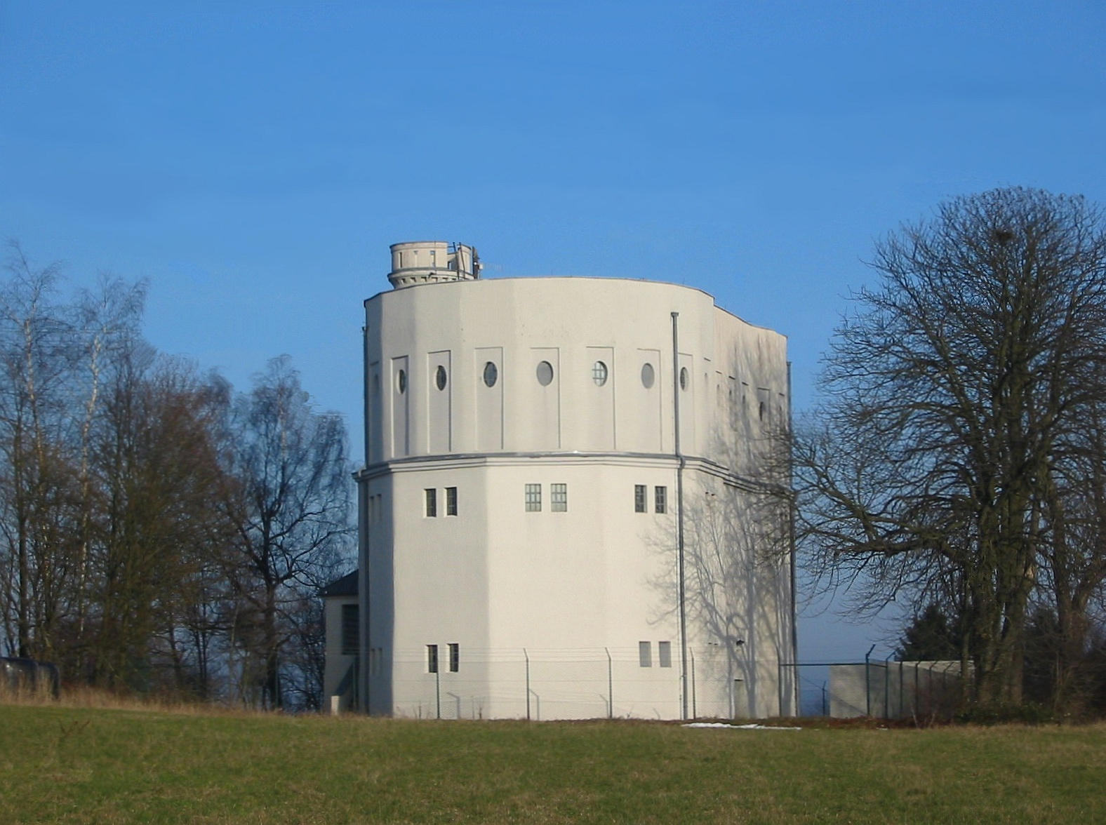 Wasserturm Göttelborn (Stromleitungen entfernt)